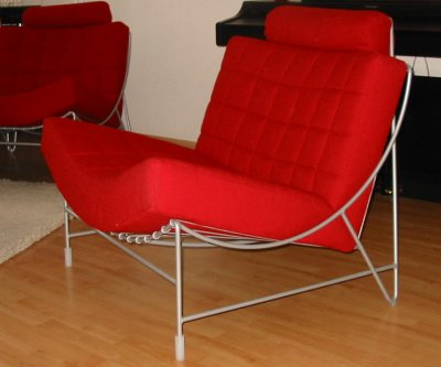 Leolux bankje uit 1991, eigen foto